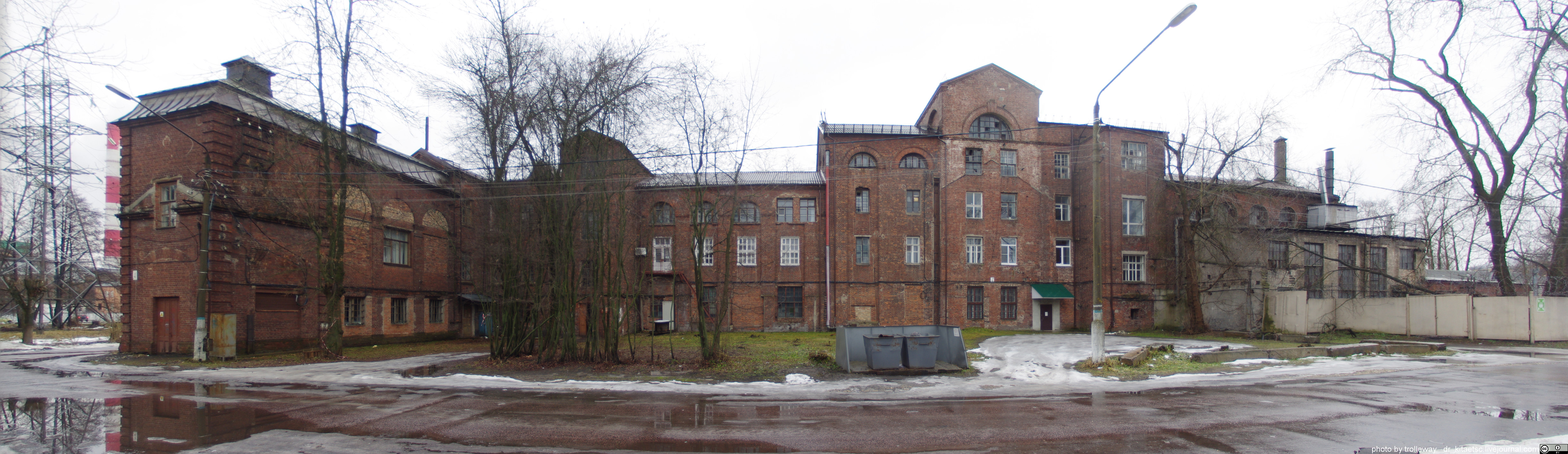 Moscow oblast, Shatura. 1920-1930s. Московская область Шатура 1920-1930-е